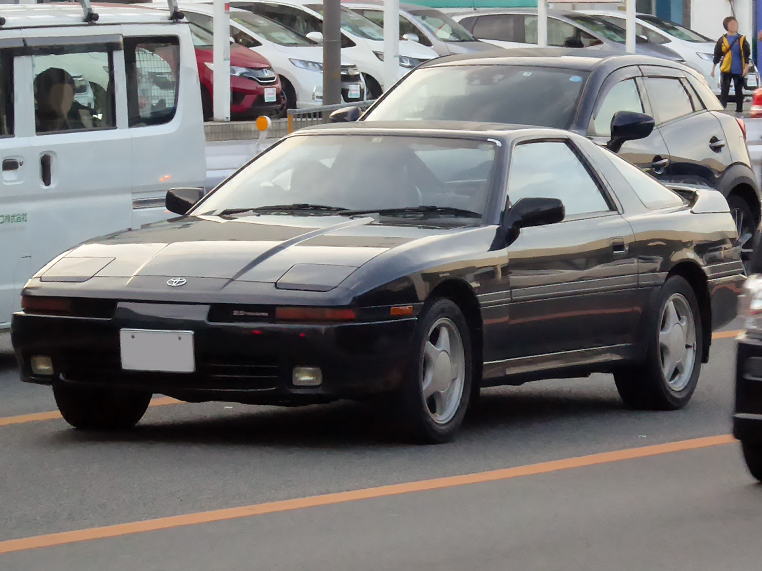 E-JZA70型トヨタ・スープラ2.5GTツインターボをフロントから撮影。